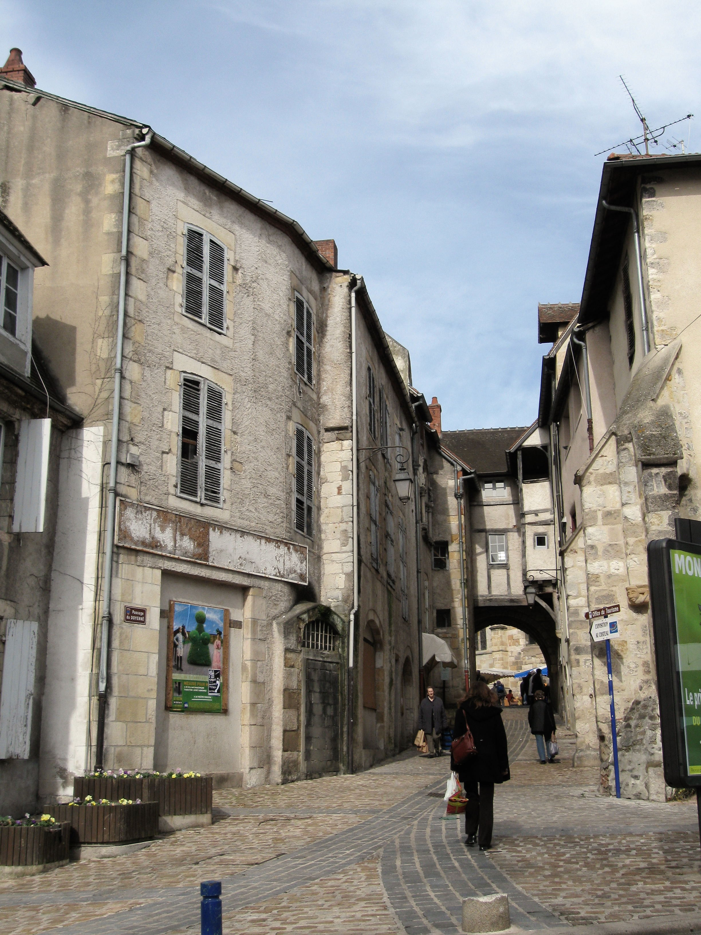 Passage du Doyenné, Montluçon, Allier, France